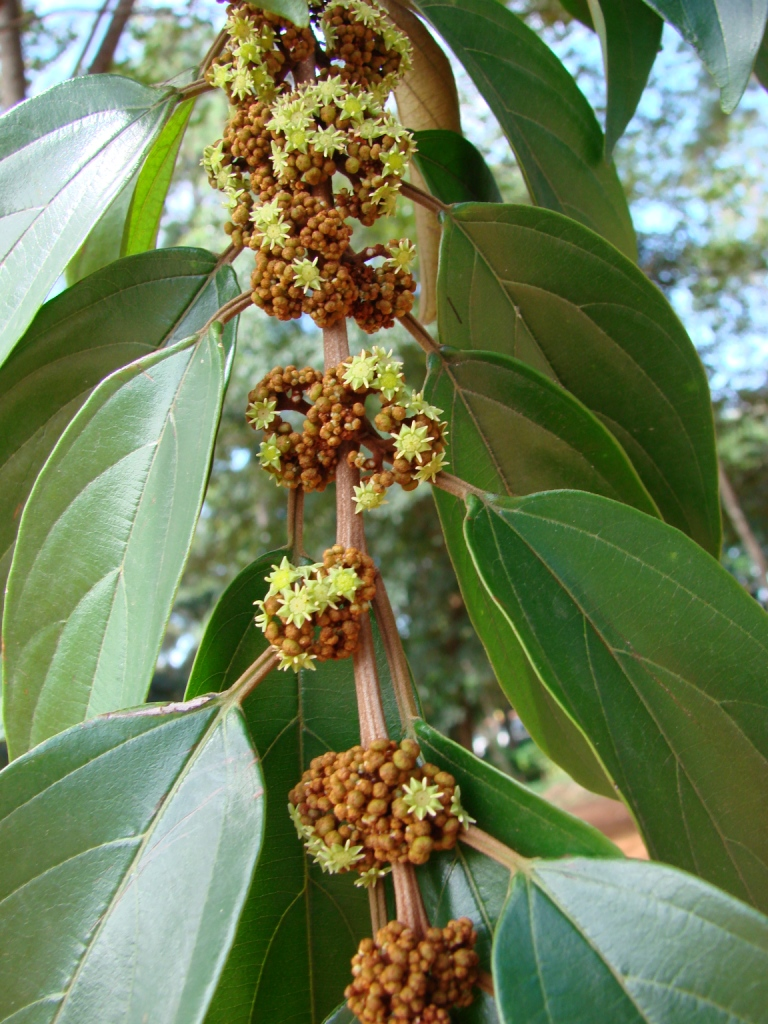 Colubrina glandulosa - RHAMNACEAE Campus da Universidade de Brasília - Distrito Federal - Brasil.